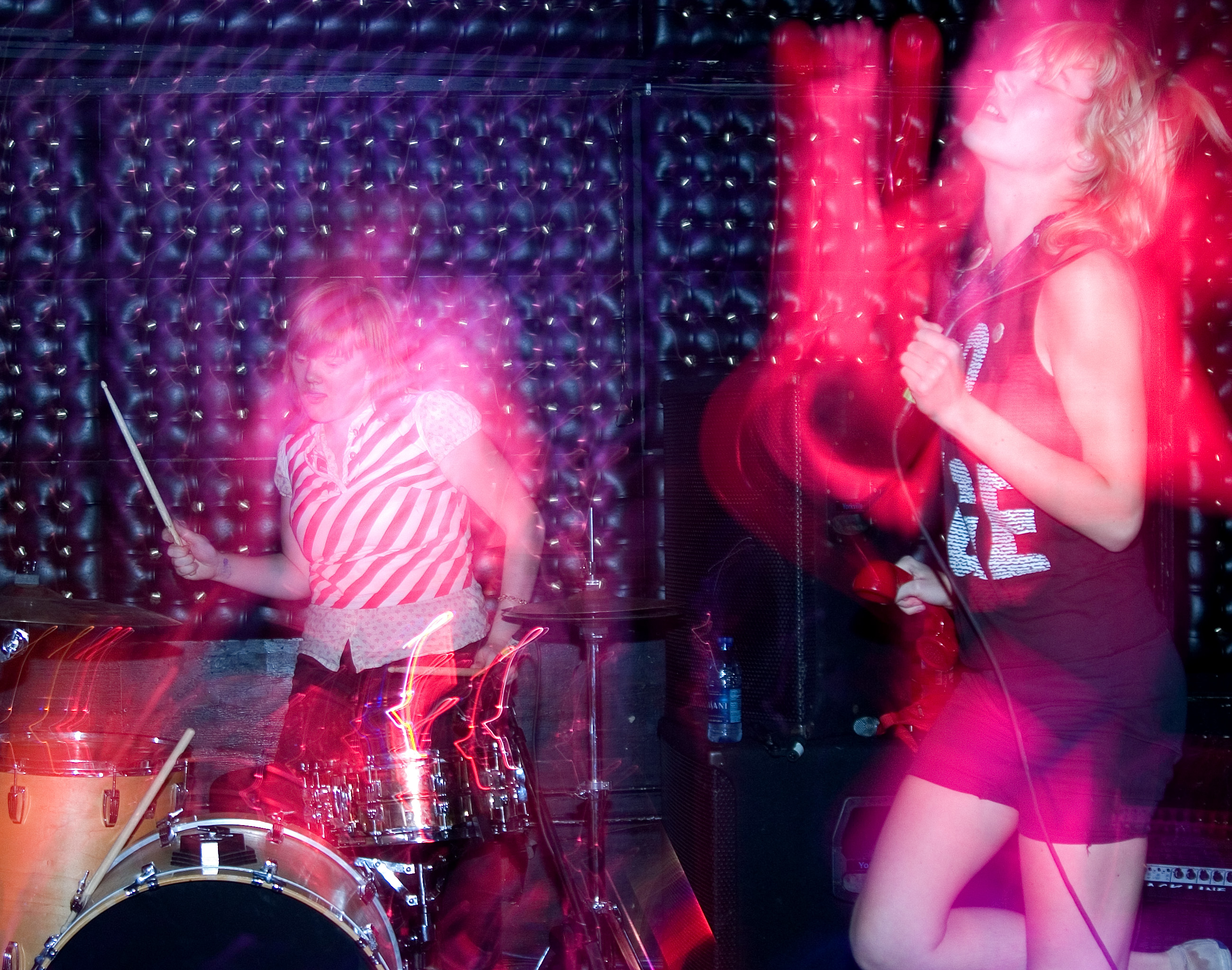 Mika Miko at the Casbah, 2006-09-27.